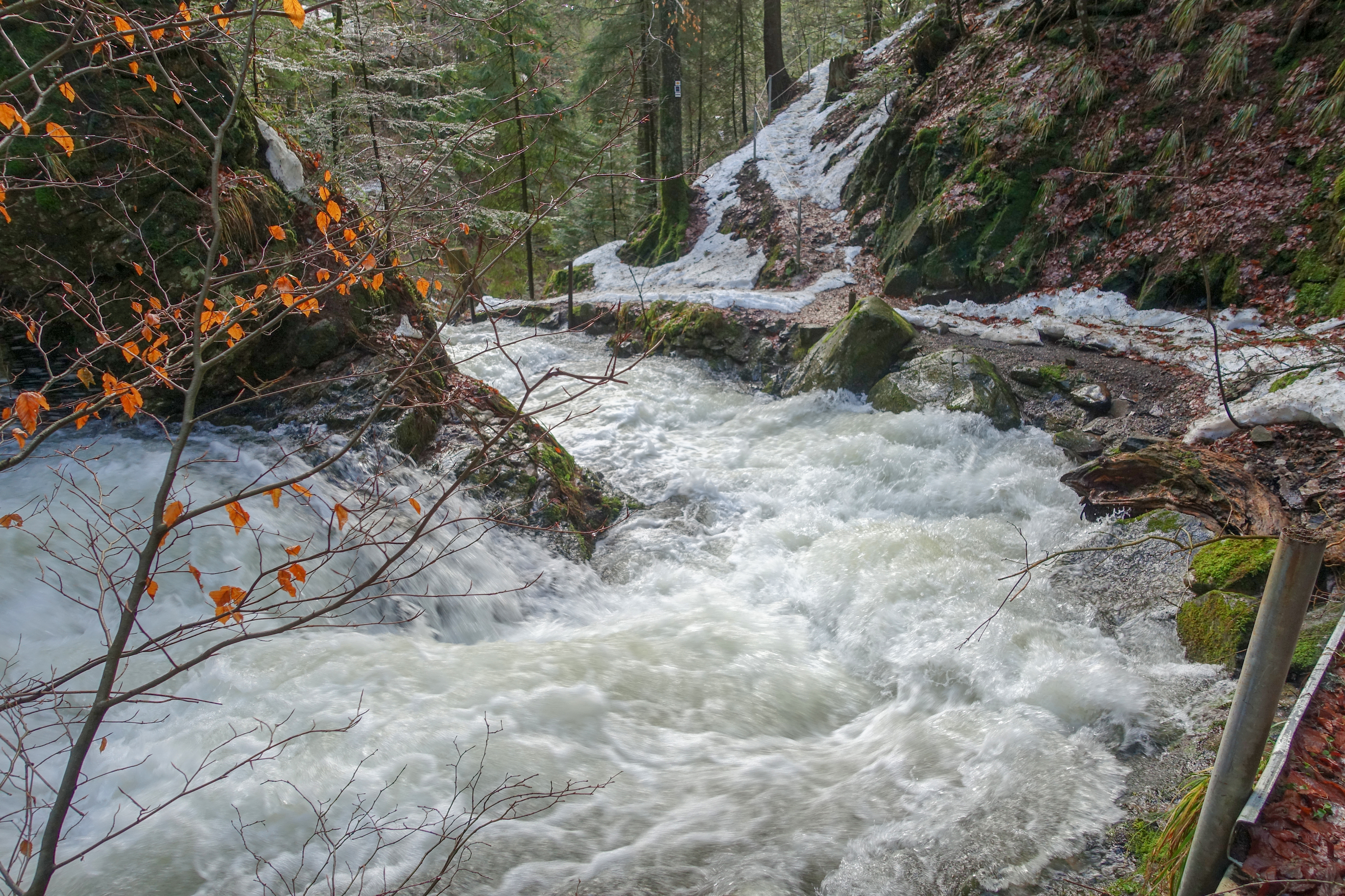 Todtmooser Wasserfälle